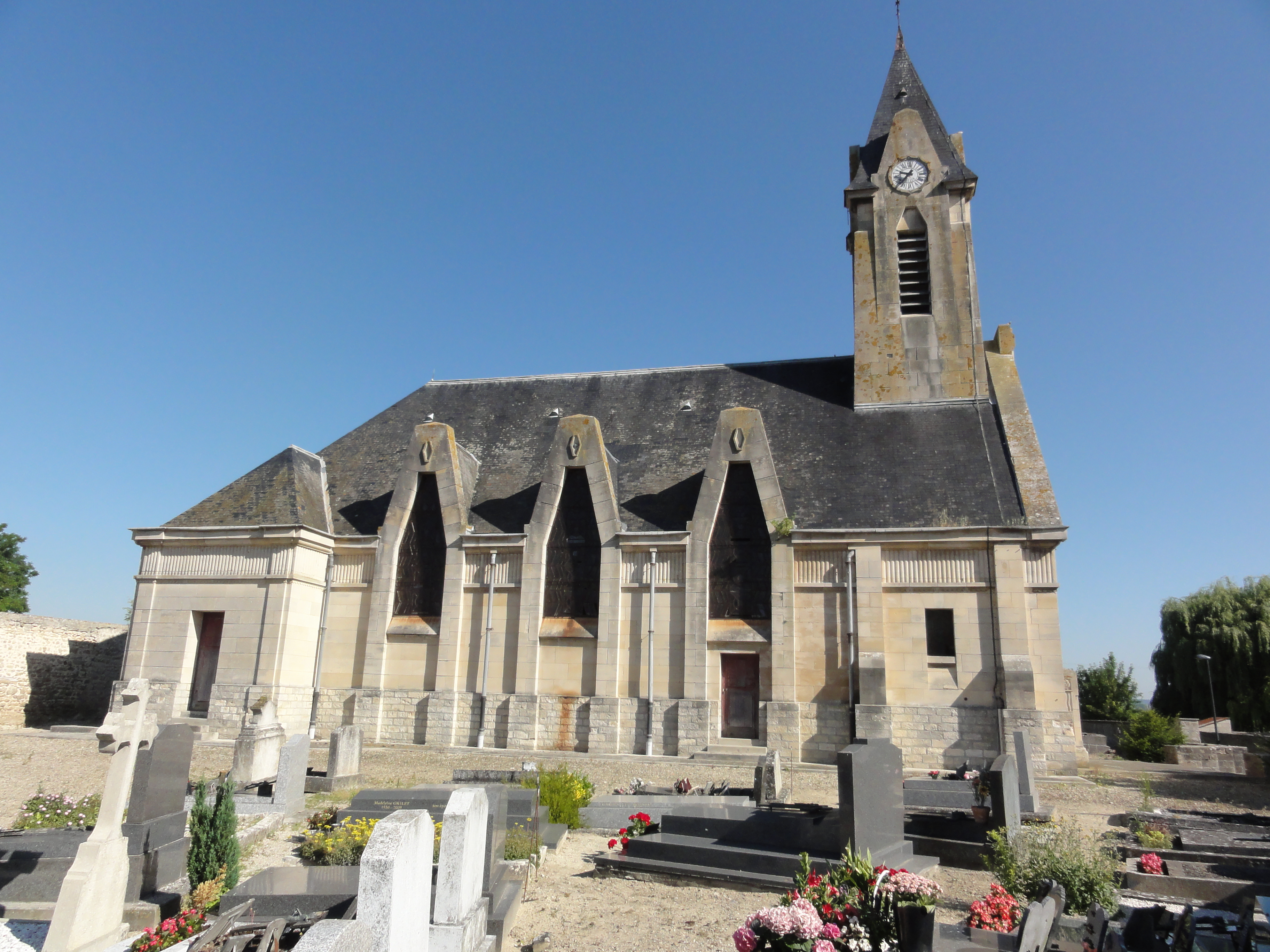 Concevreux (Aisne) église